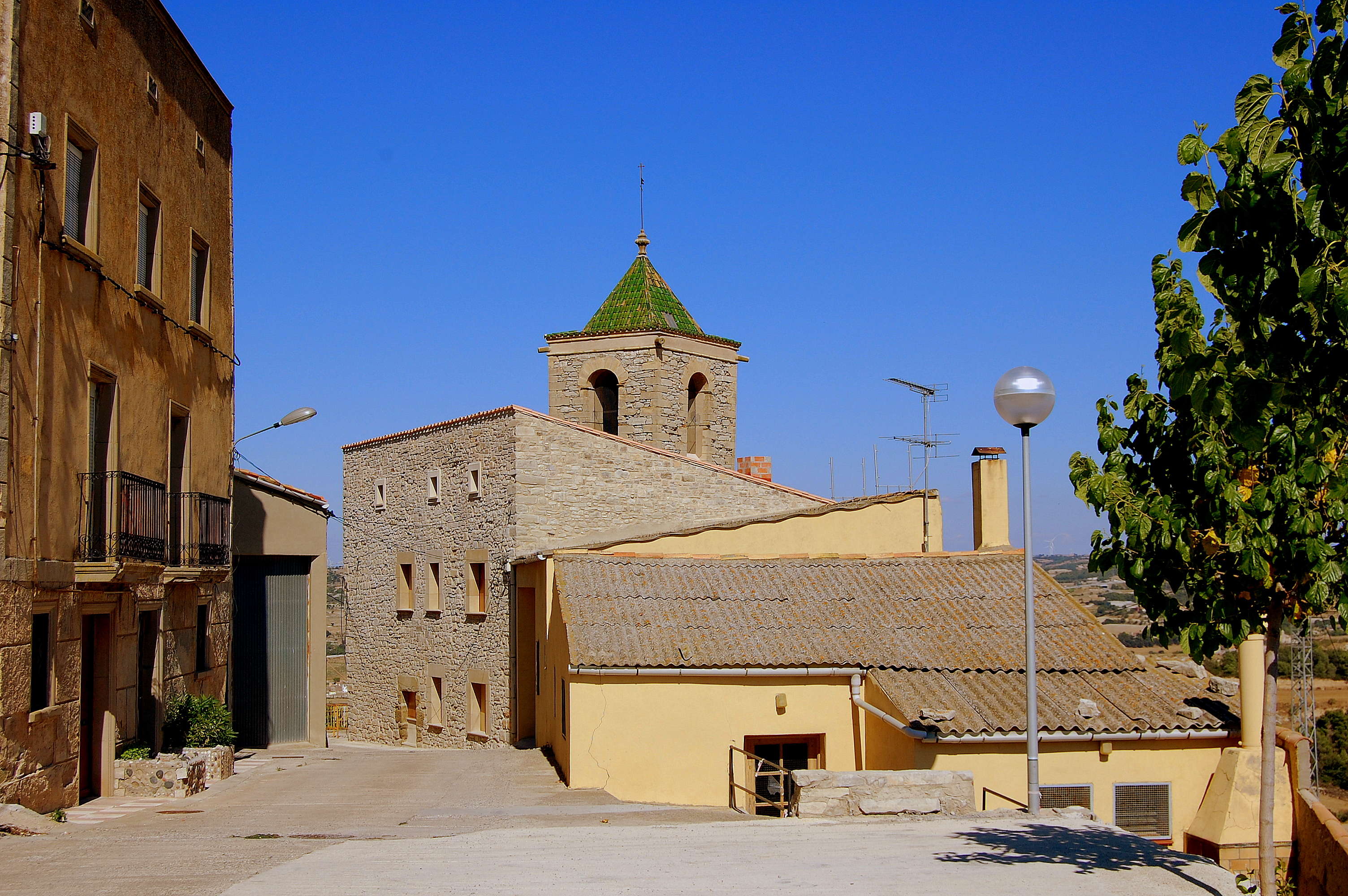 Església parroquial de Santa Maria de Rubinat (Ribera d'Ondara)